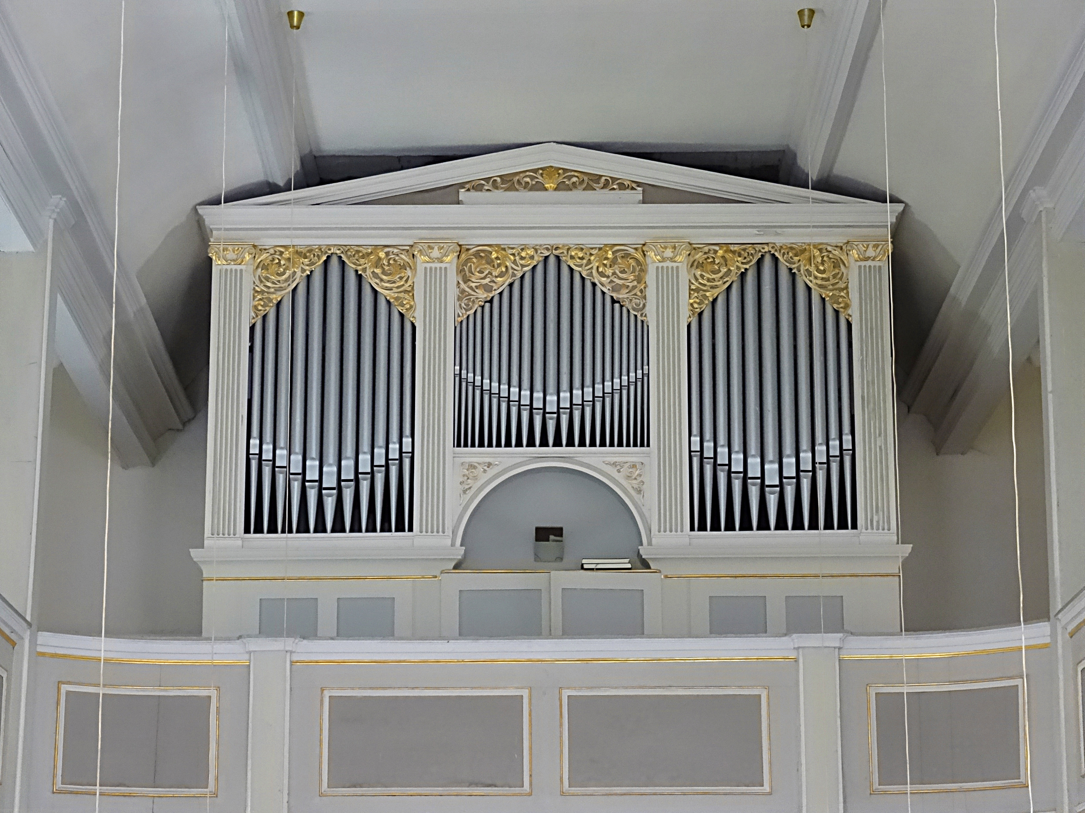 Orgel von Louis Witzmann (1866, II/P 20) in der Dorfkirche St. Petri (Kutzleben)[1]